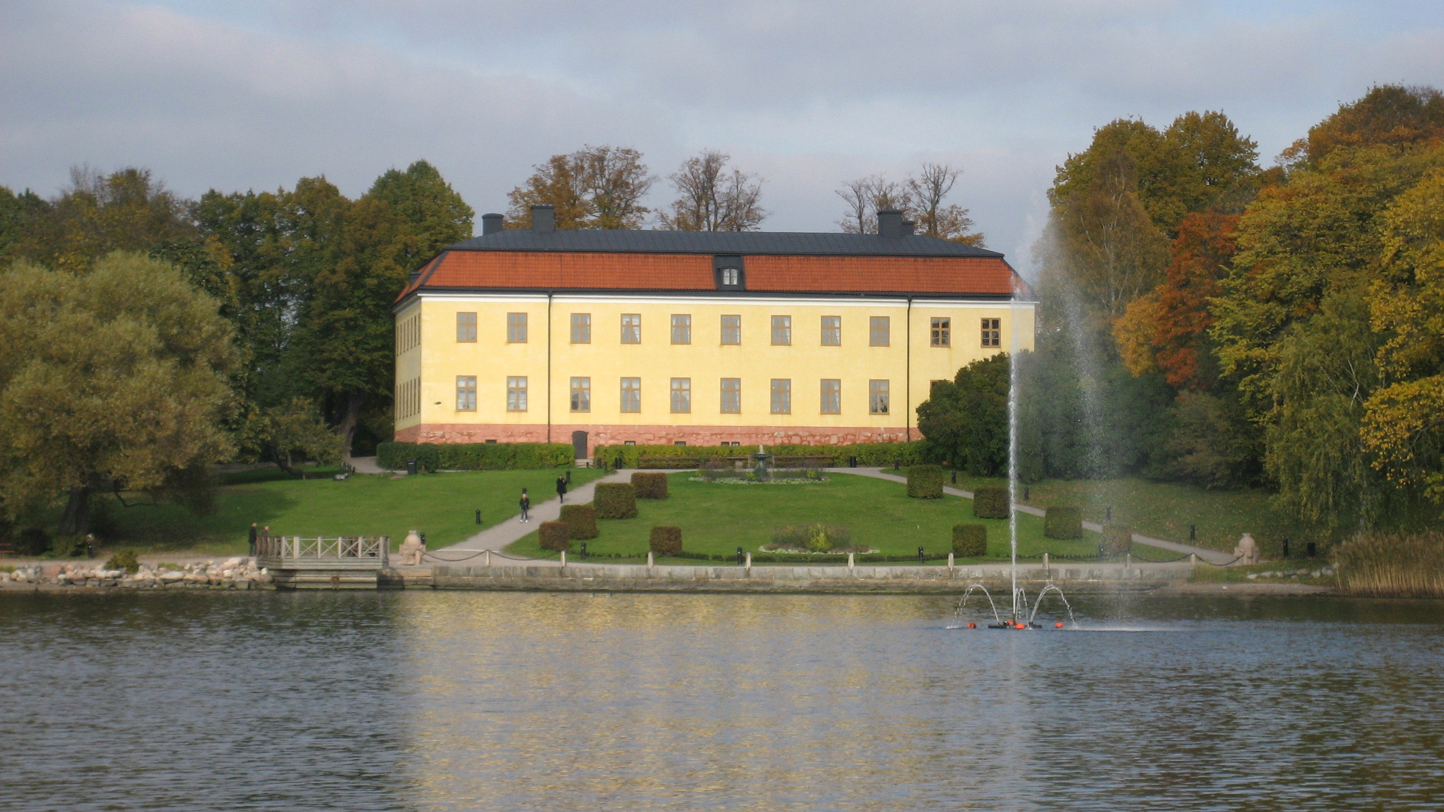 Edsbergs slott, Sollentuna.